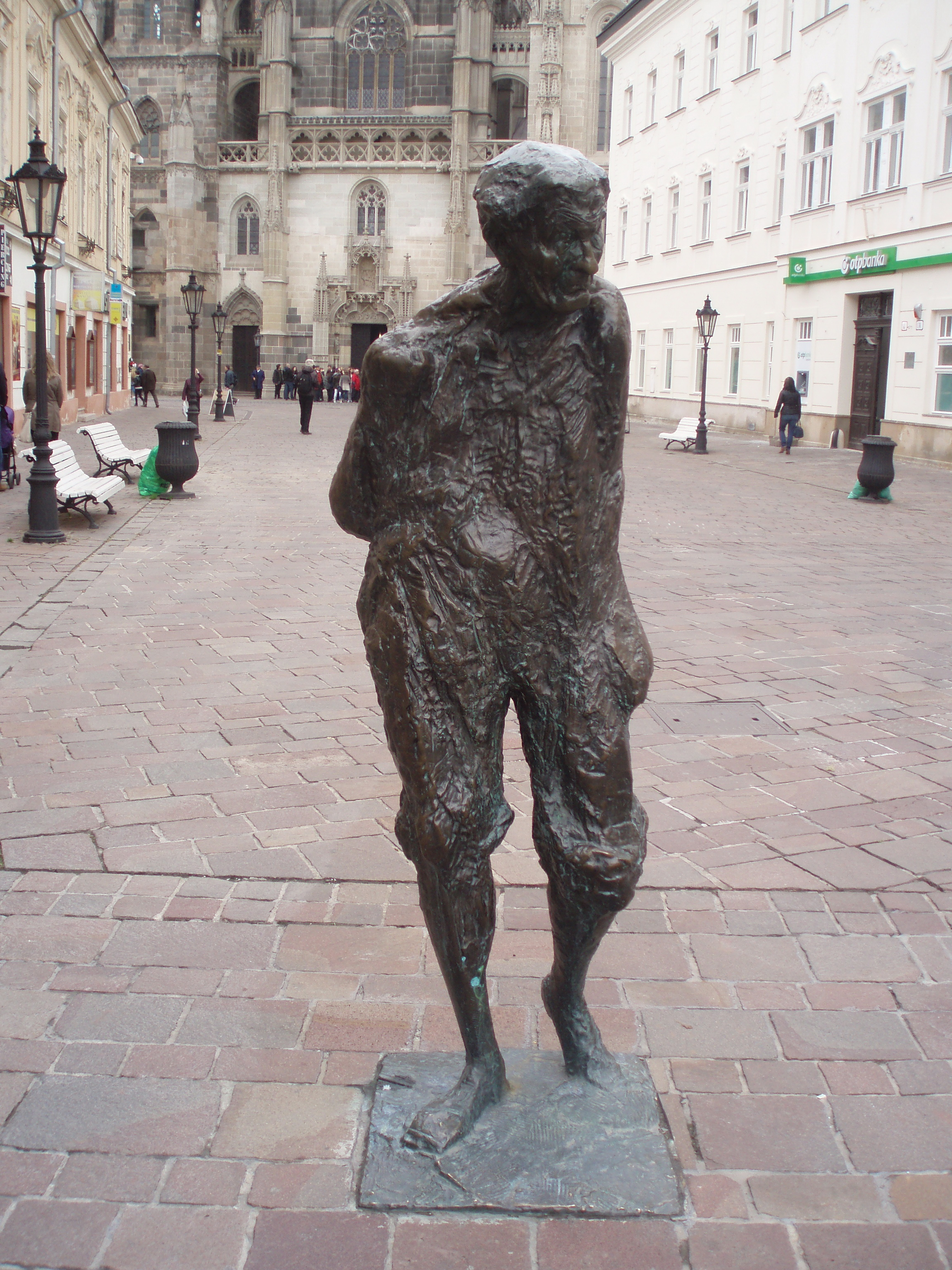 Jakoby Gyula (1903-1985) festőművész szobra Kassán, az Erzsébet utcában (Alžbetina). Alkotó Bartusz György szobrász (sz. 1933.), 2001-ben (eredetileg: 1982)